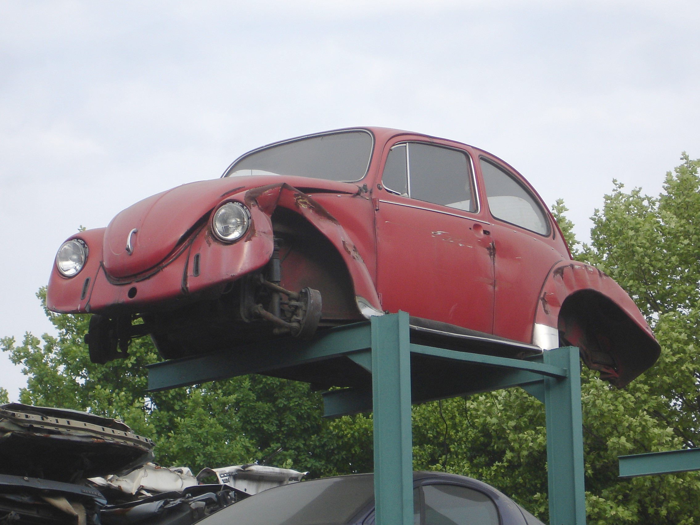 Autowrack VW Käfer 1300